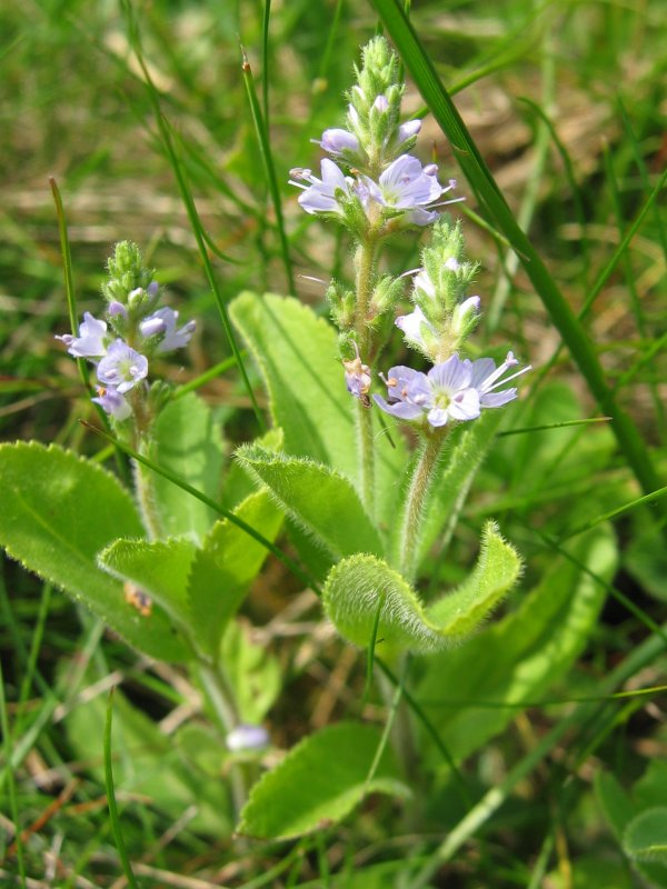 Echter Ehrenpreis Veronica officinalis, Zingst